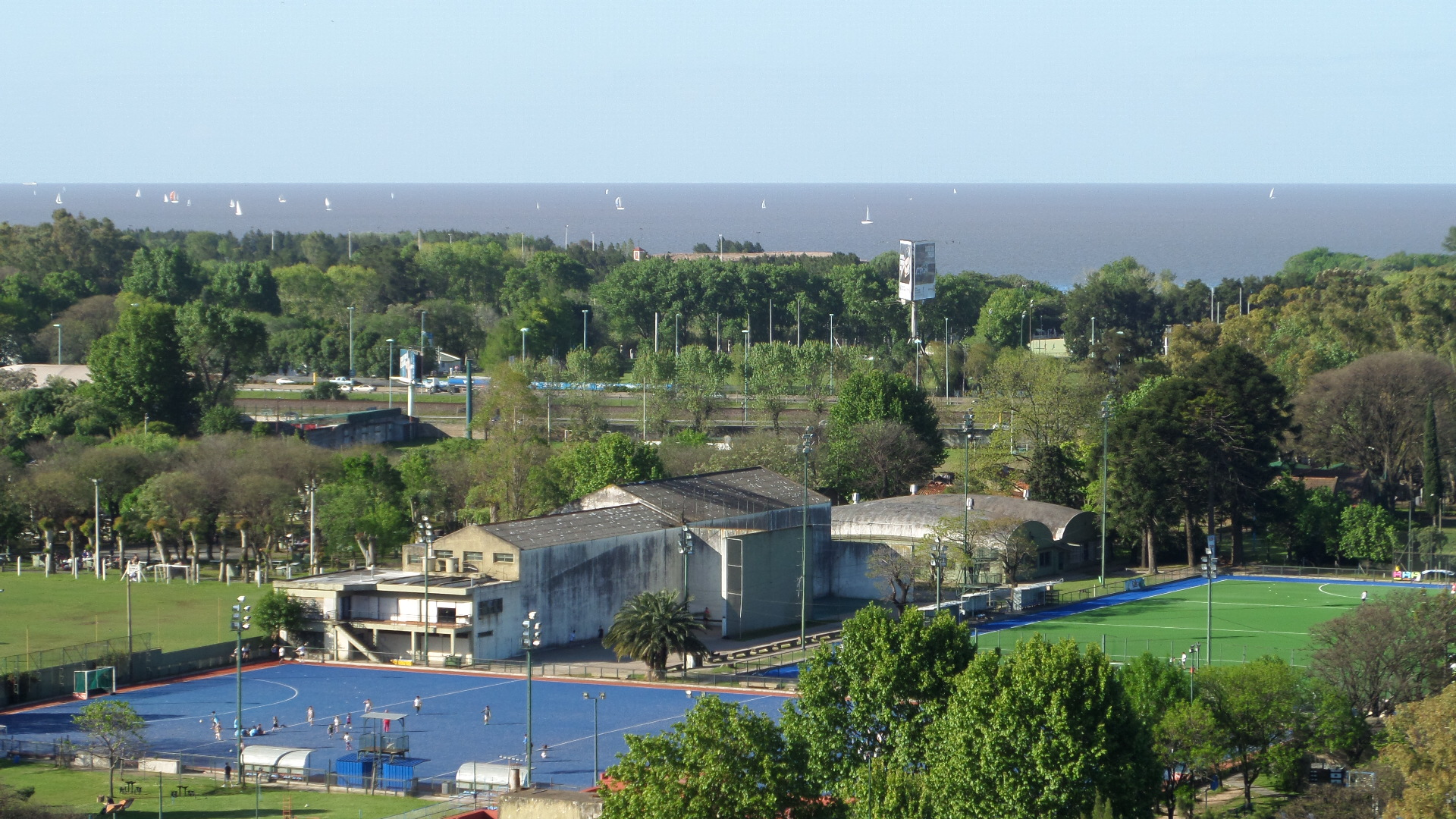 Club Ciudad De Buenos Aires